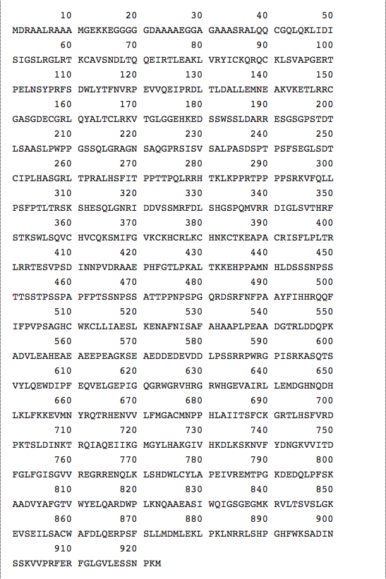 Imatge de la seqüència d'aminoàcids de la KSR1 humana mitjançant Uniprot.